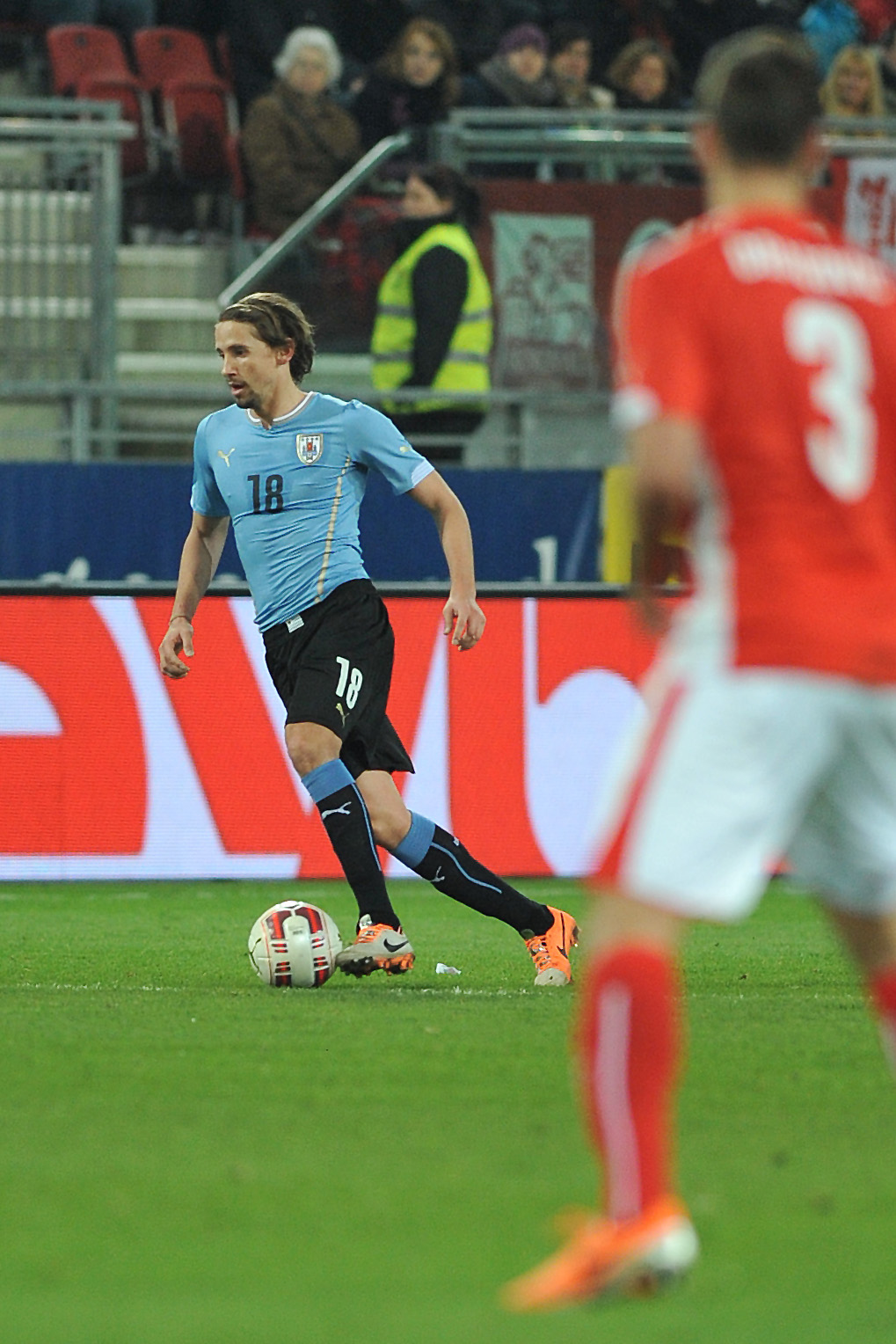 Freundschaftliches Länderspiel Österreich - Uruguay am 5. März 2014 in Klagenfurt: Gastón Ramírez